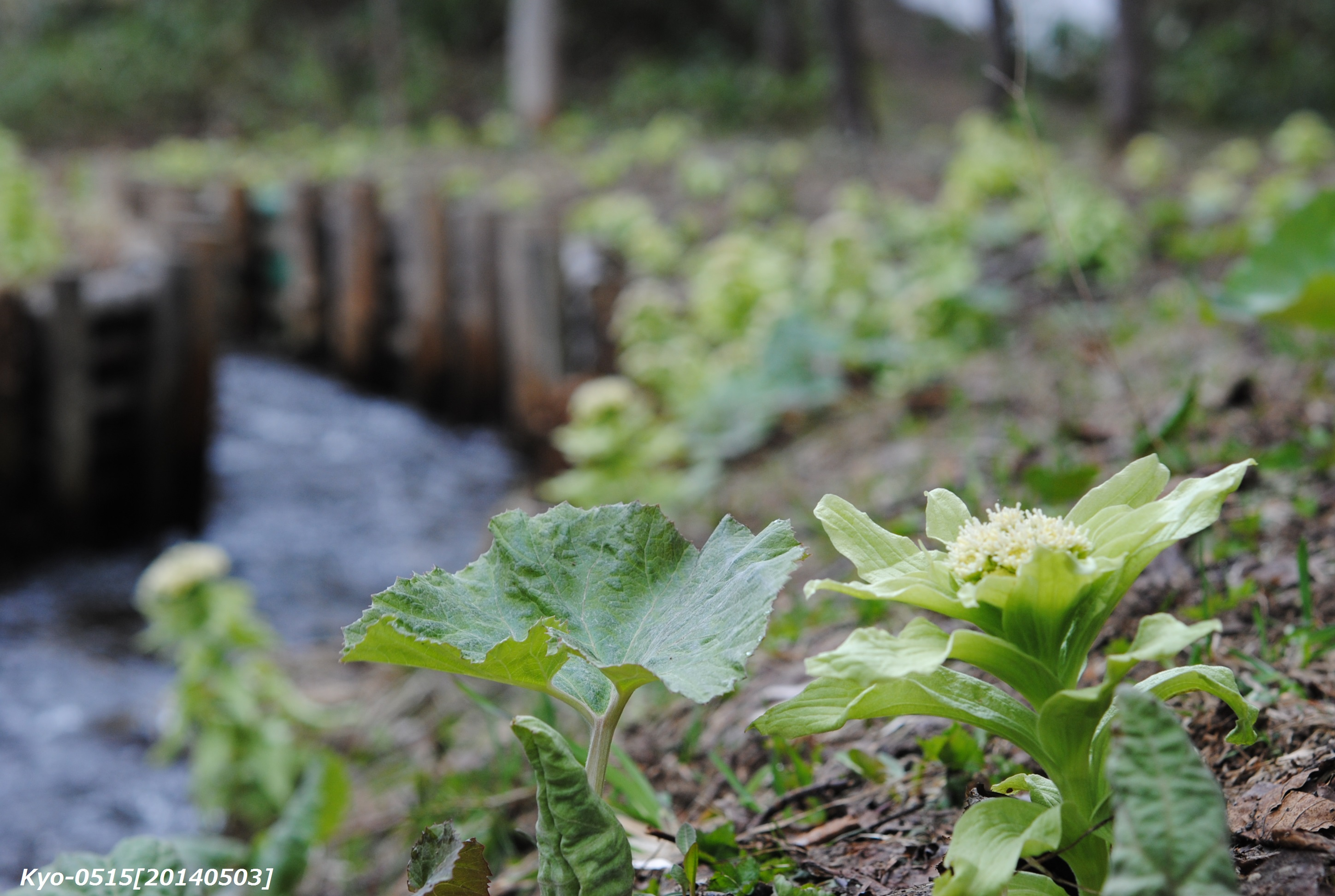 礼文島にて